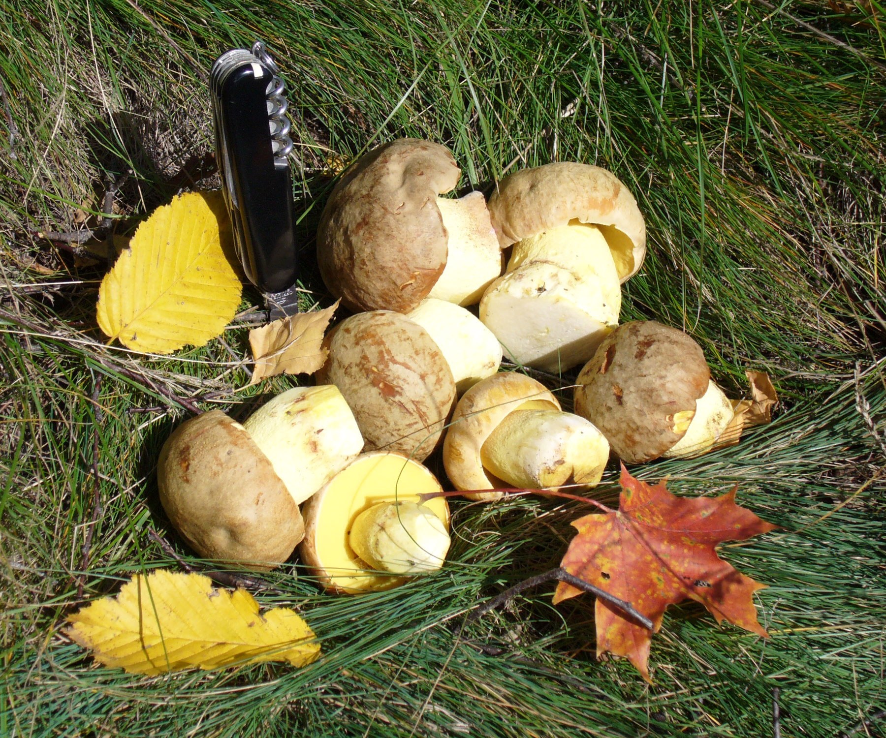 Боровик желтый, полубелый гриб.(Boletus impolitus))